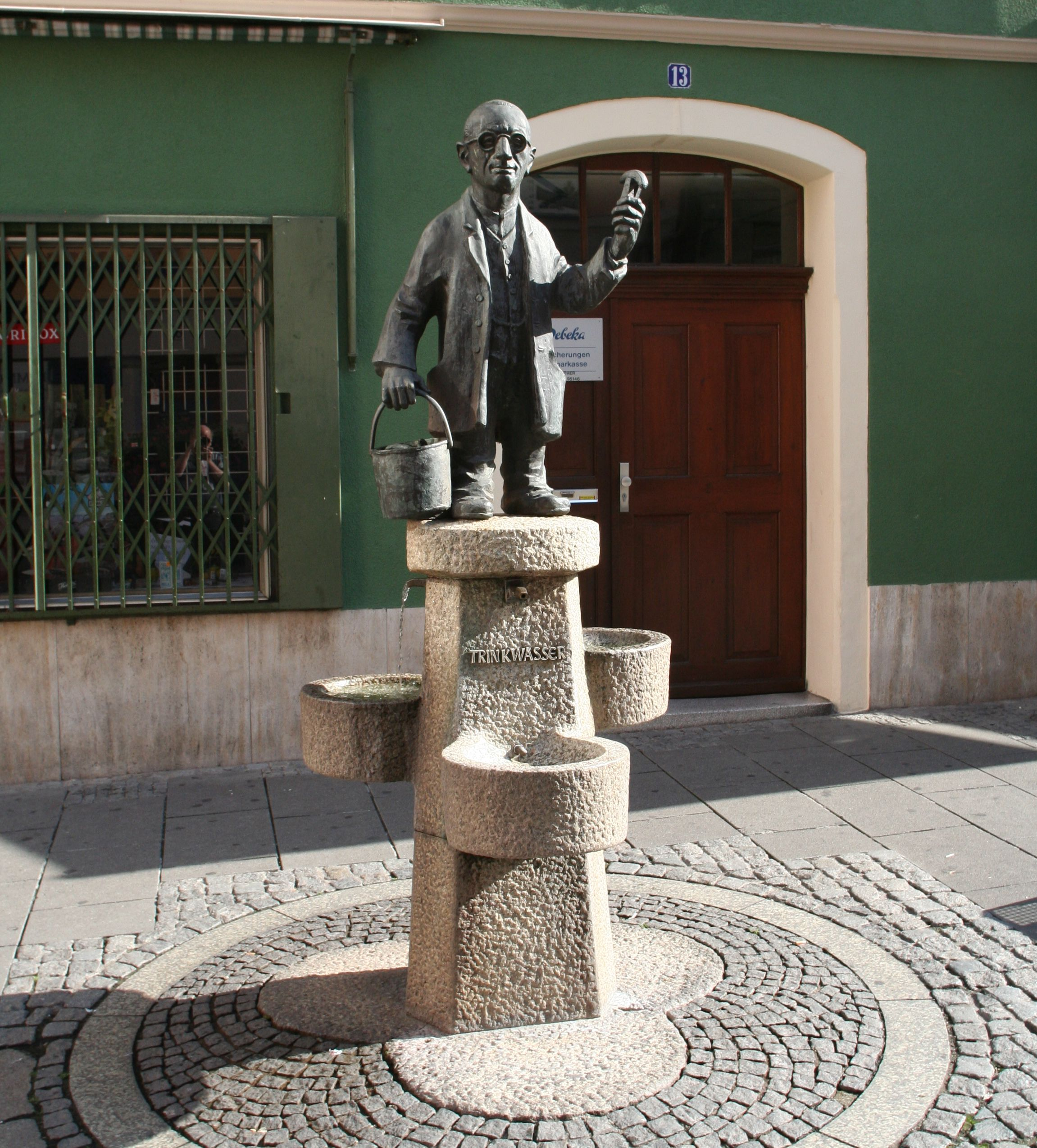 Gurken-Alex-Brunnen in Herrngasse in Coburg